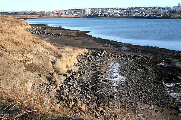 Fossvogurinn séður frá Nauthólfsvík inn vogin yfir á Kársnesið Kópavogsmegin